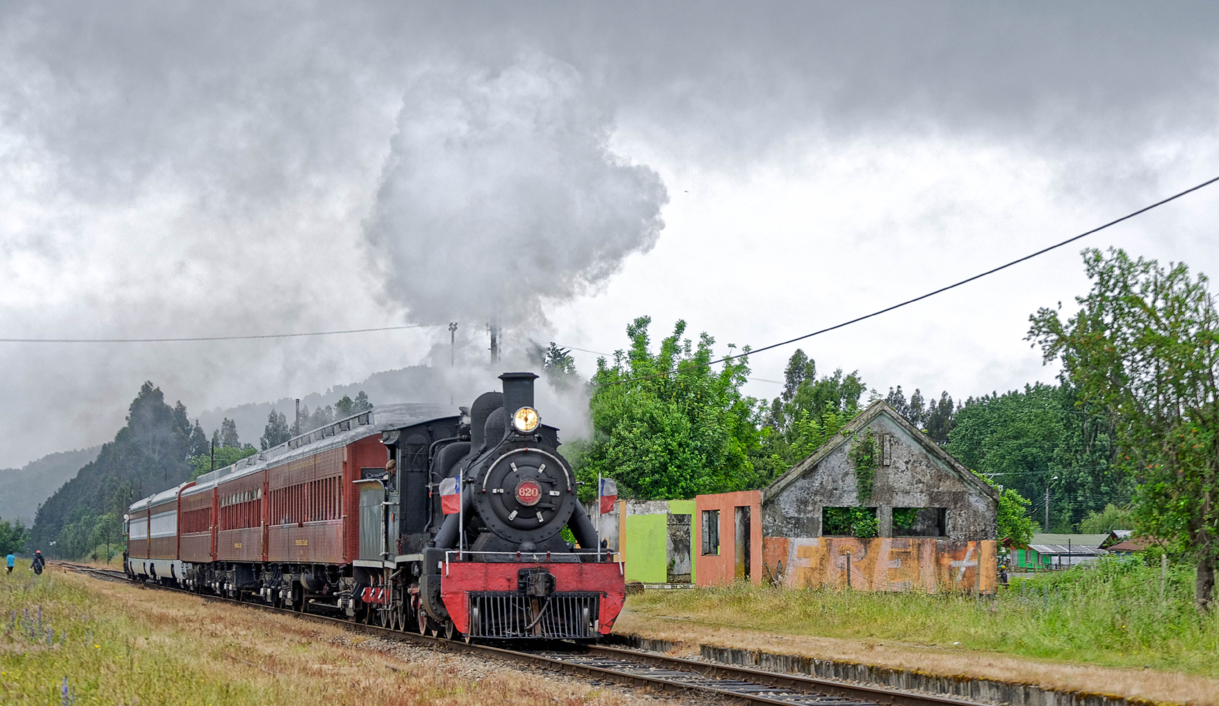 El tiempo pasa y los vestigios de un pasado esplendoroso poco a poco comienzan a borrarse, al compas de la lluvia y los grises cielos del sur, La pequeña 620 no cesa en su andar y trae a la memoria de los lugareños, aquellos días en que el tren era el protagonista de las vidas de miles de habitantes que hacían del progreso en tierras sureñas. Tren el Valdiviano, rumbo a Valdivia, en el marco de la celrebracion del Aniversario de la llegada del ferrocarril de Valdivia a Pichirropulli. Diciembre. 2015